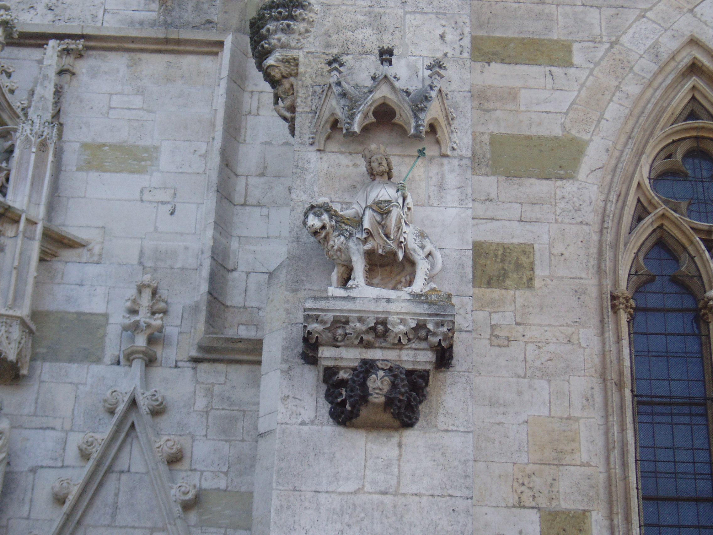 Regensburger Dom. Der König no. 3. Die Skulptur auf der westlichen Fassade